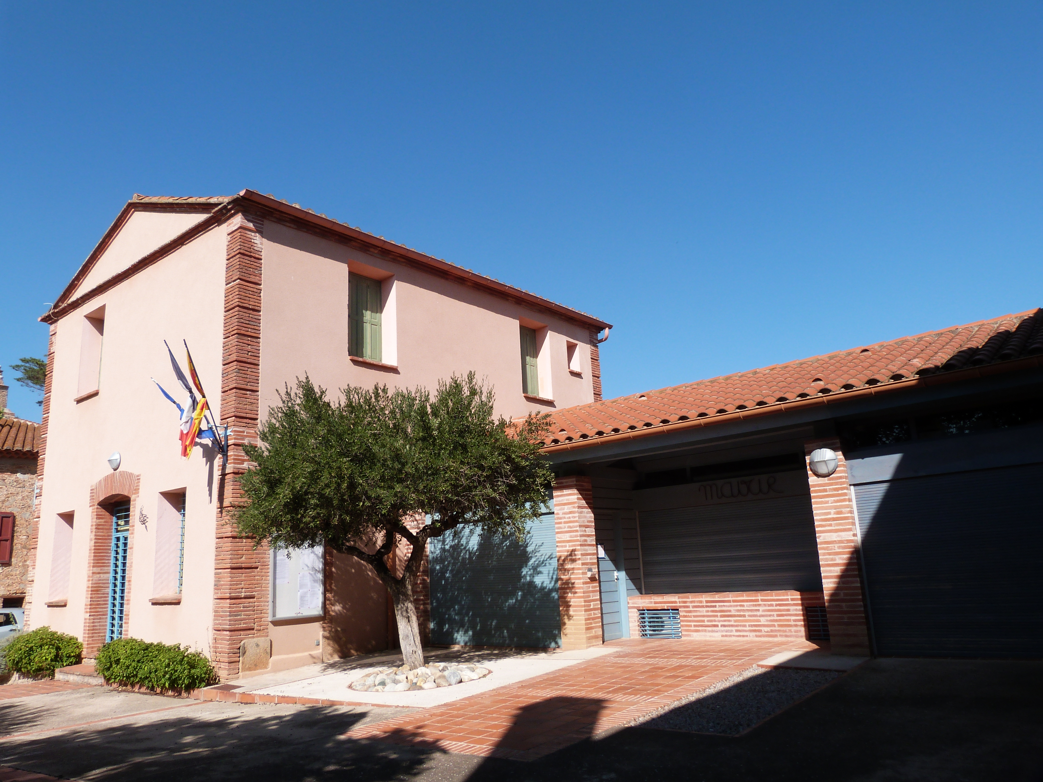 Mairie de la ville de Sainte-Colombe-de-la-Commanderie